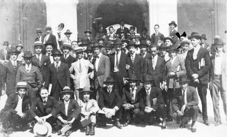 Huelga de Dolores de 1922.